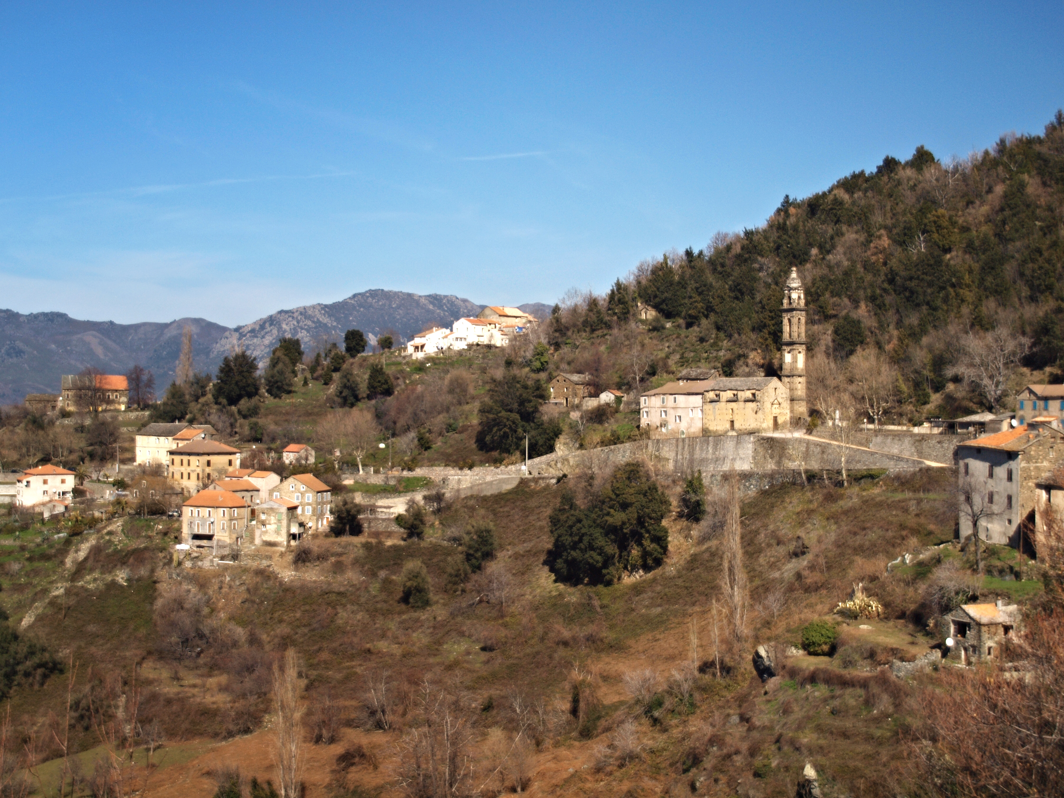 Castello-di-Rostino, Rustinu (Corse) - Vue de l'église Santa Maria Annunziata de Pastureccia et des hameaux de Barinciasche et du Gustalbiu